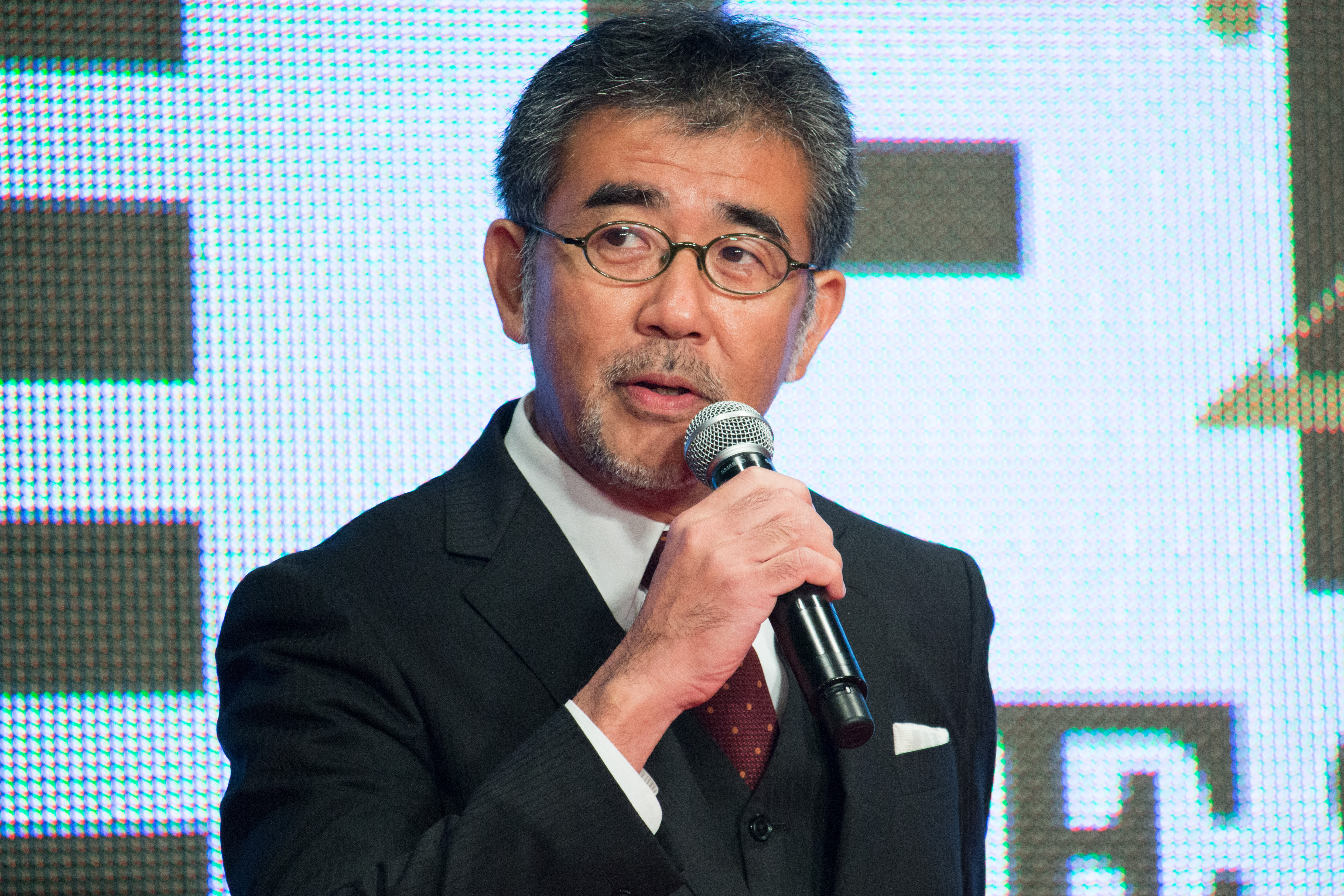 第28回 東京国際映画祭 オープニングセレモニー 篠原哲雄 (起終点駅 ターミナル)